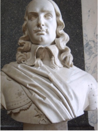 Buste de François de Vendôme (1616-1669), Galerie des batailles du château de Versailles